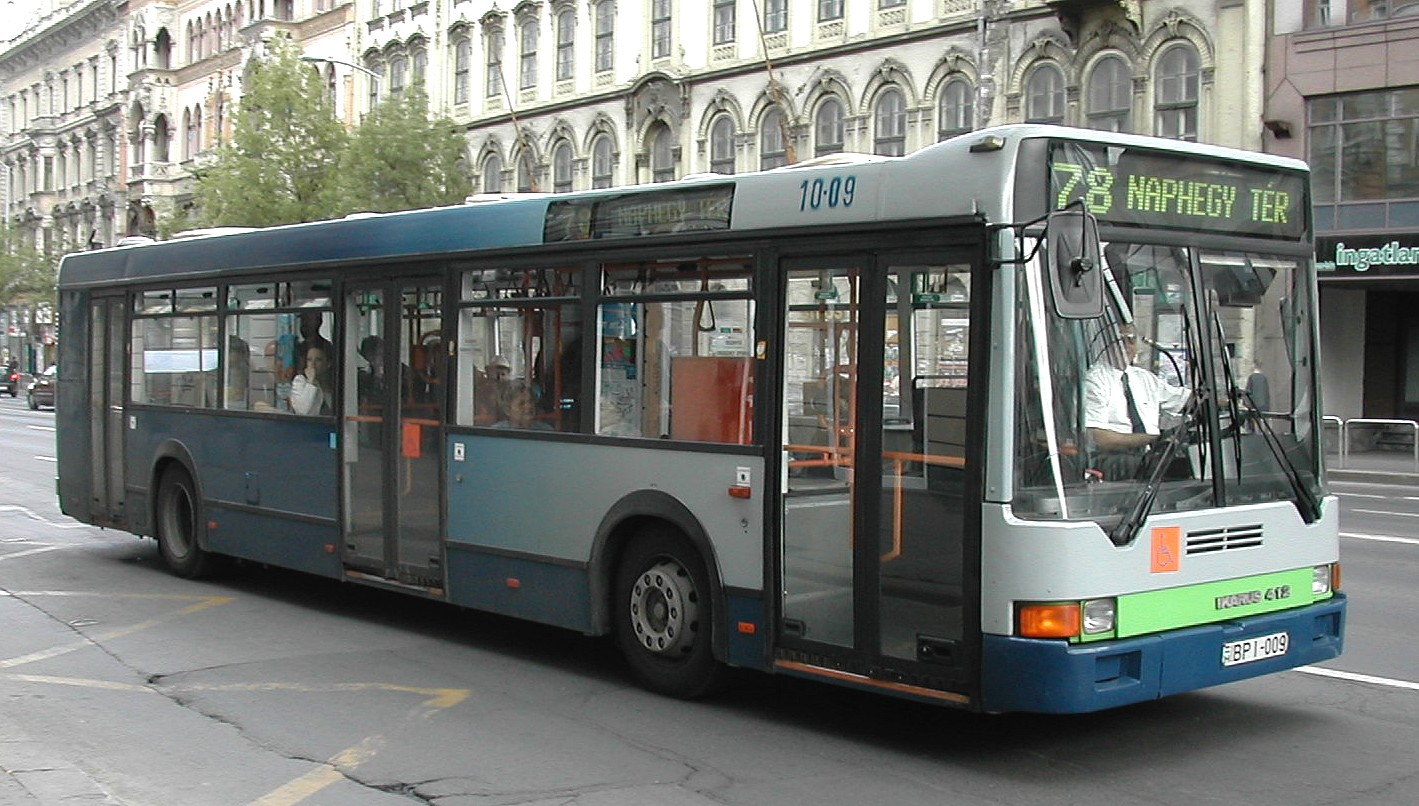 Ikarus-412 in Budapest